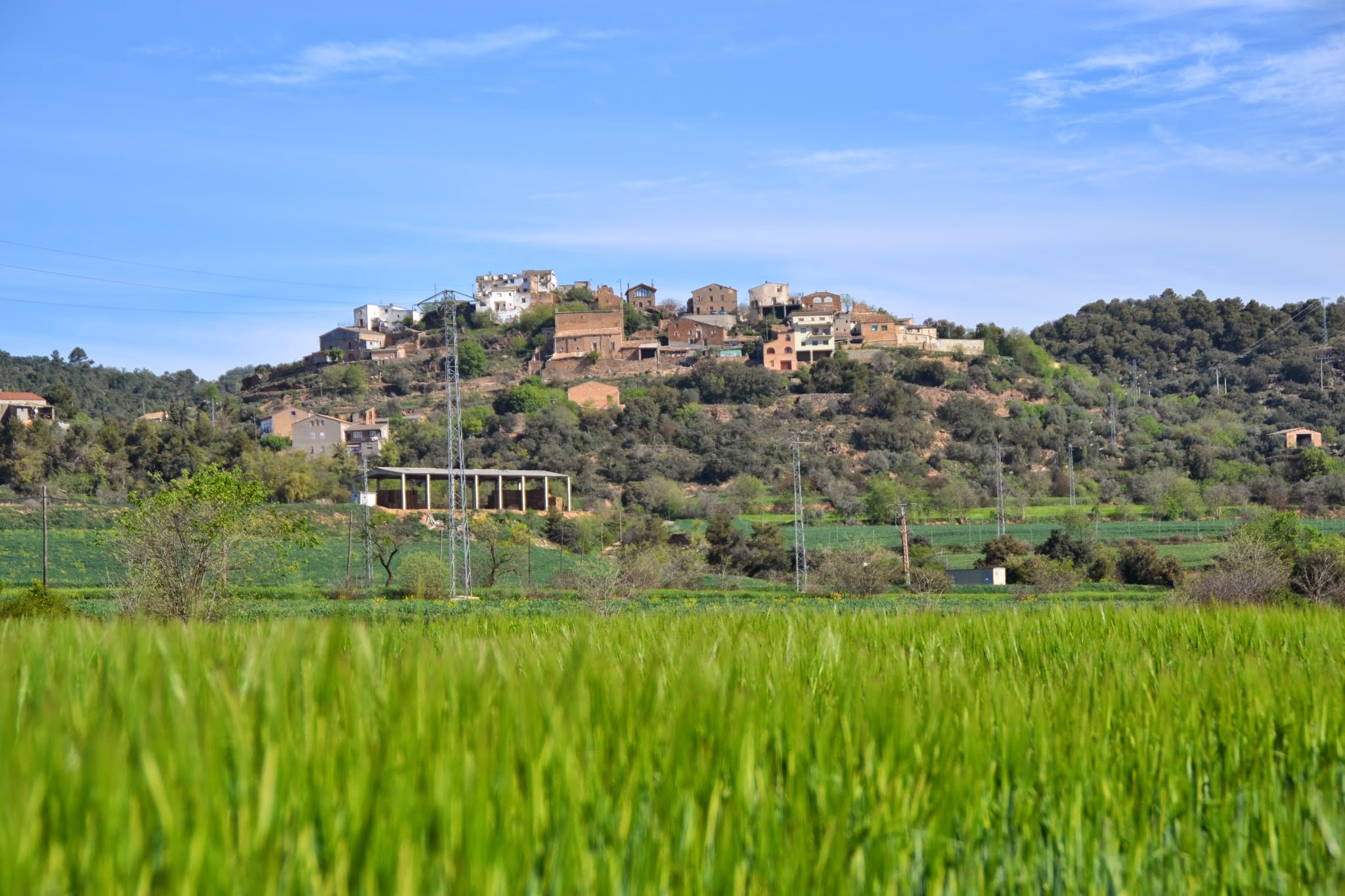 Vista de Montargull des del Pla de Montargull